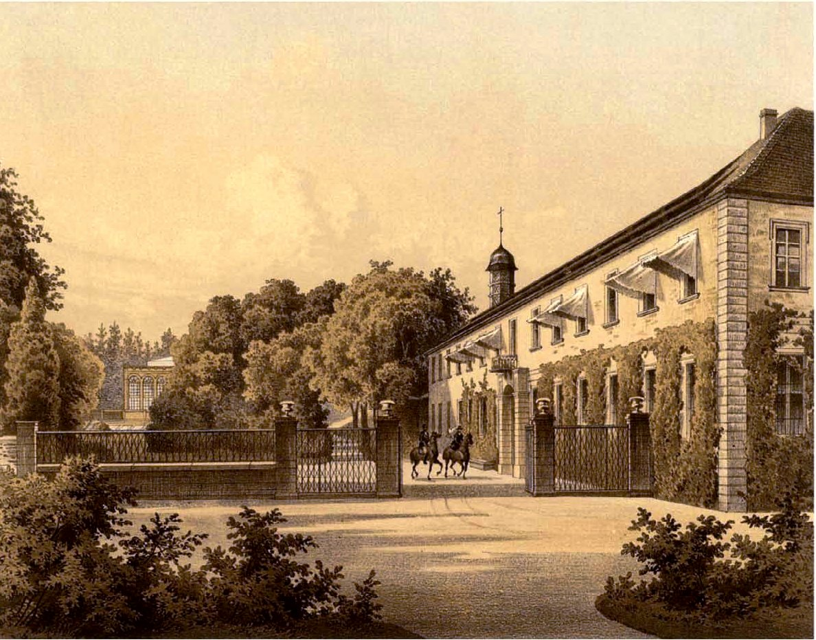 Althaldensleben, Kreis Neuhaldensleben, Provinz Sachsen